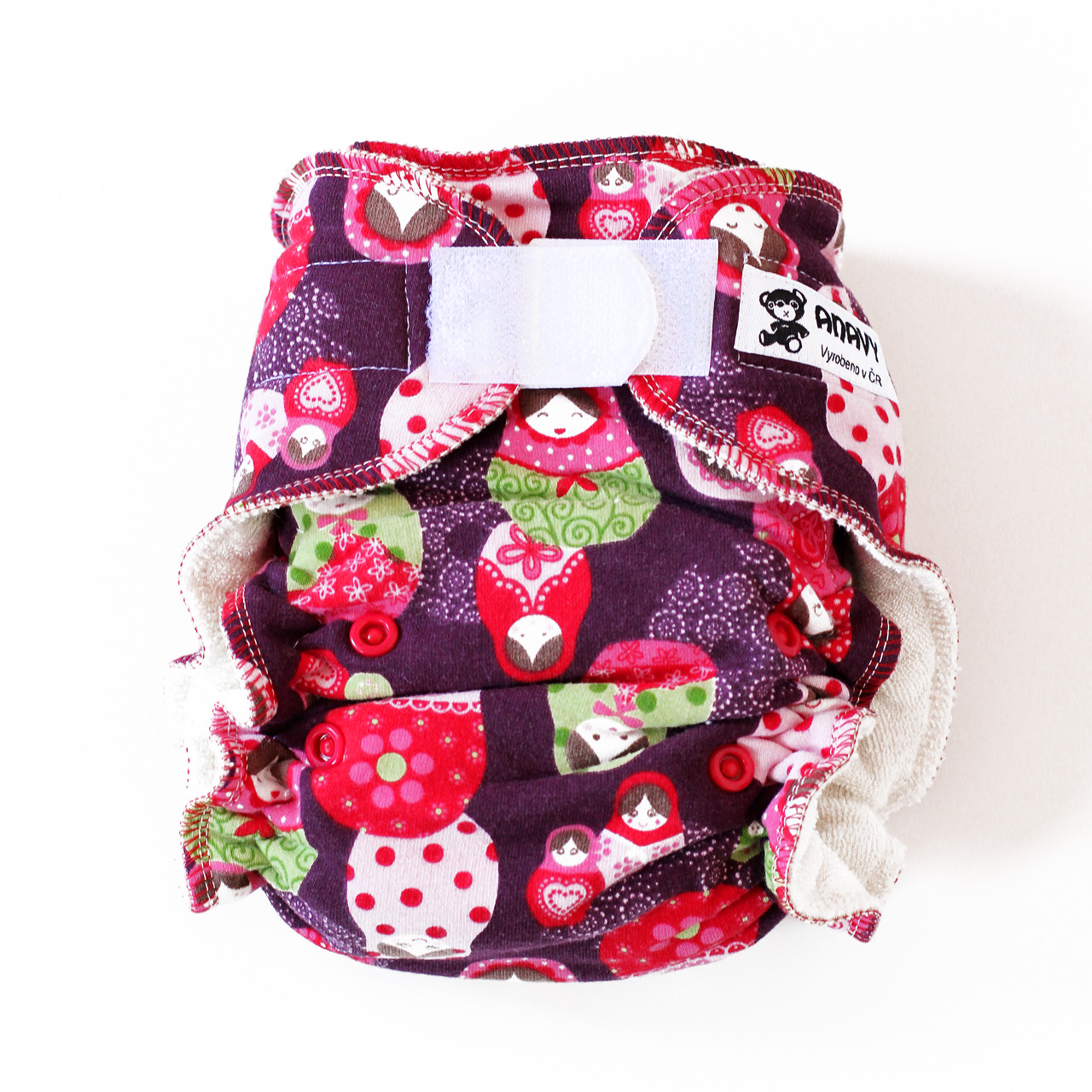 Látková plena se vzorem